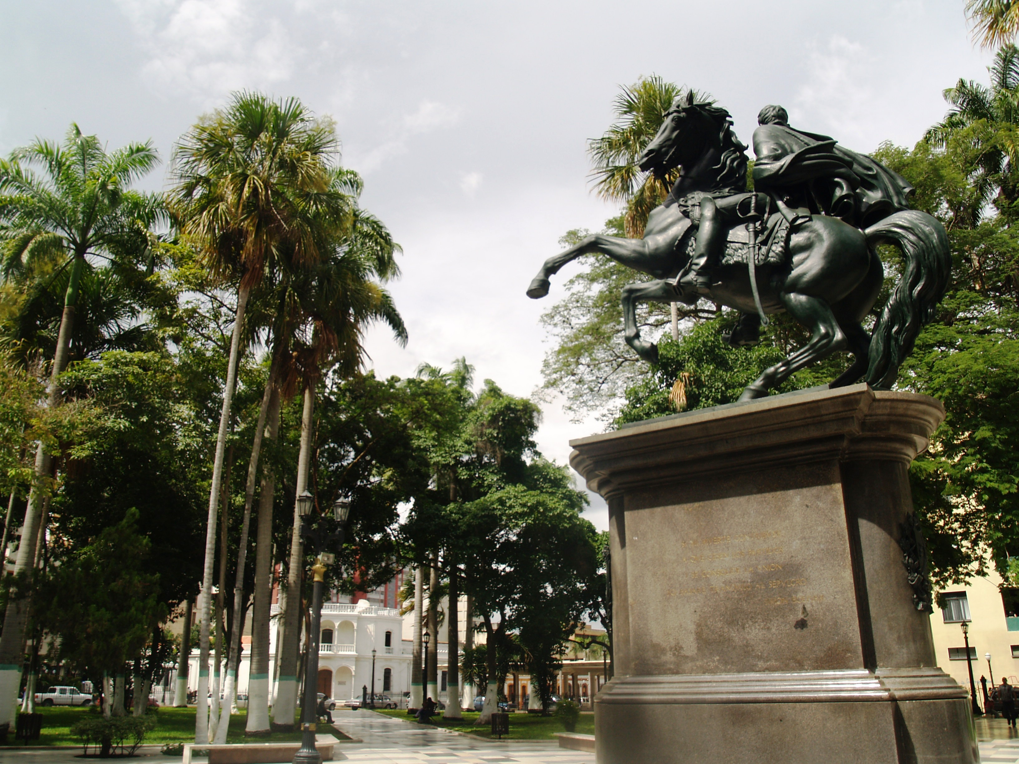 Estatua ecuestre de Simón Bolívar sobre la plaza homónima en la ciudad de Barquisimeto.